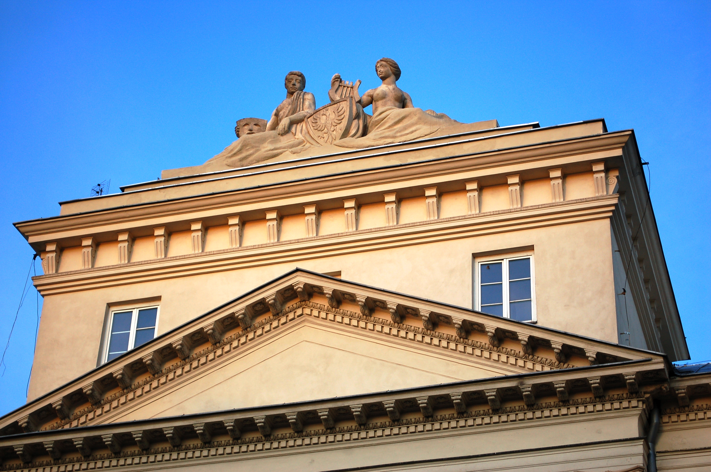 Collegium Nobilium Warsaw, Miodowa Street